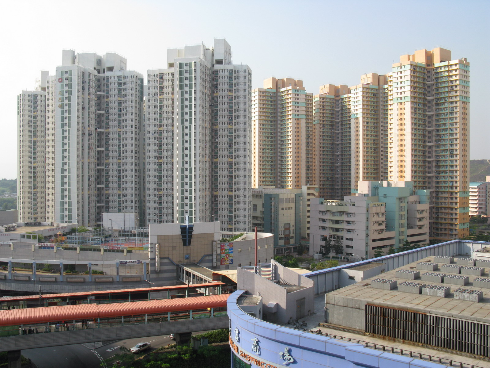 天恩邨 Tin Yan Estate